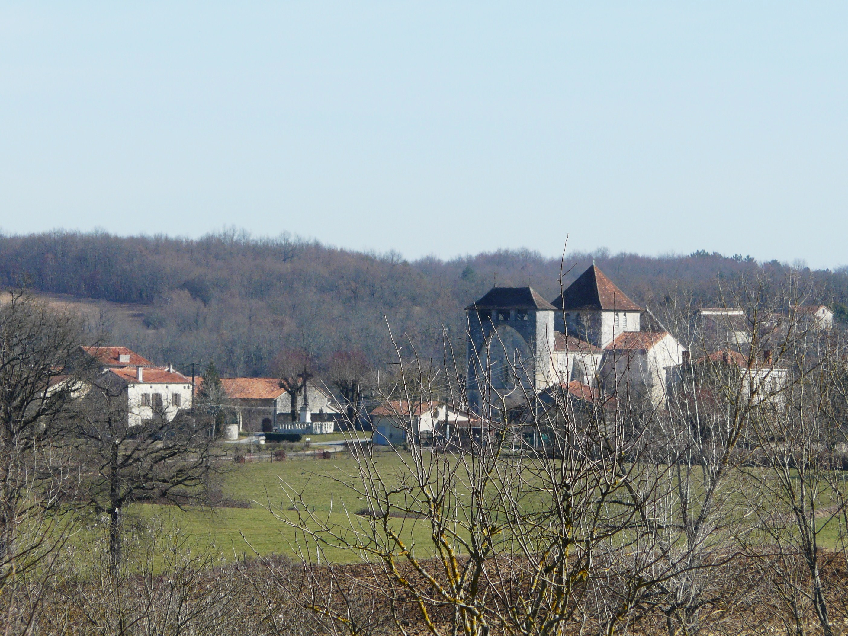 Le village de Cercles vu du sud-ouest, Dordogne, France.